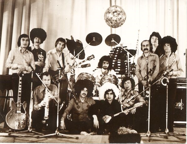 Новый состав